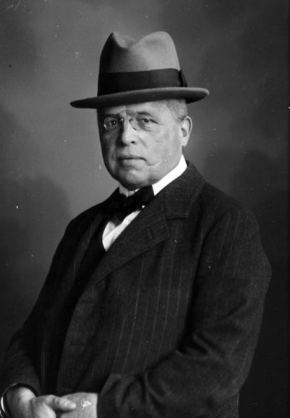 Fotografie von Prof. Dr. Franz Sootbeer (1870–1943).